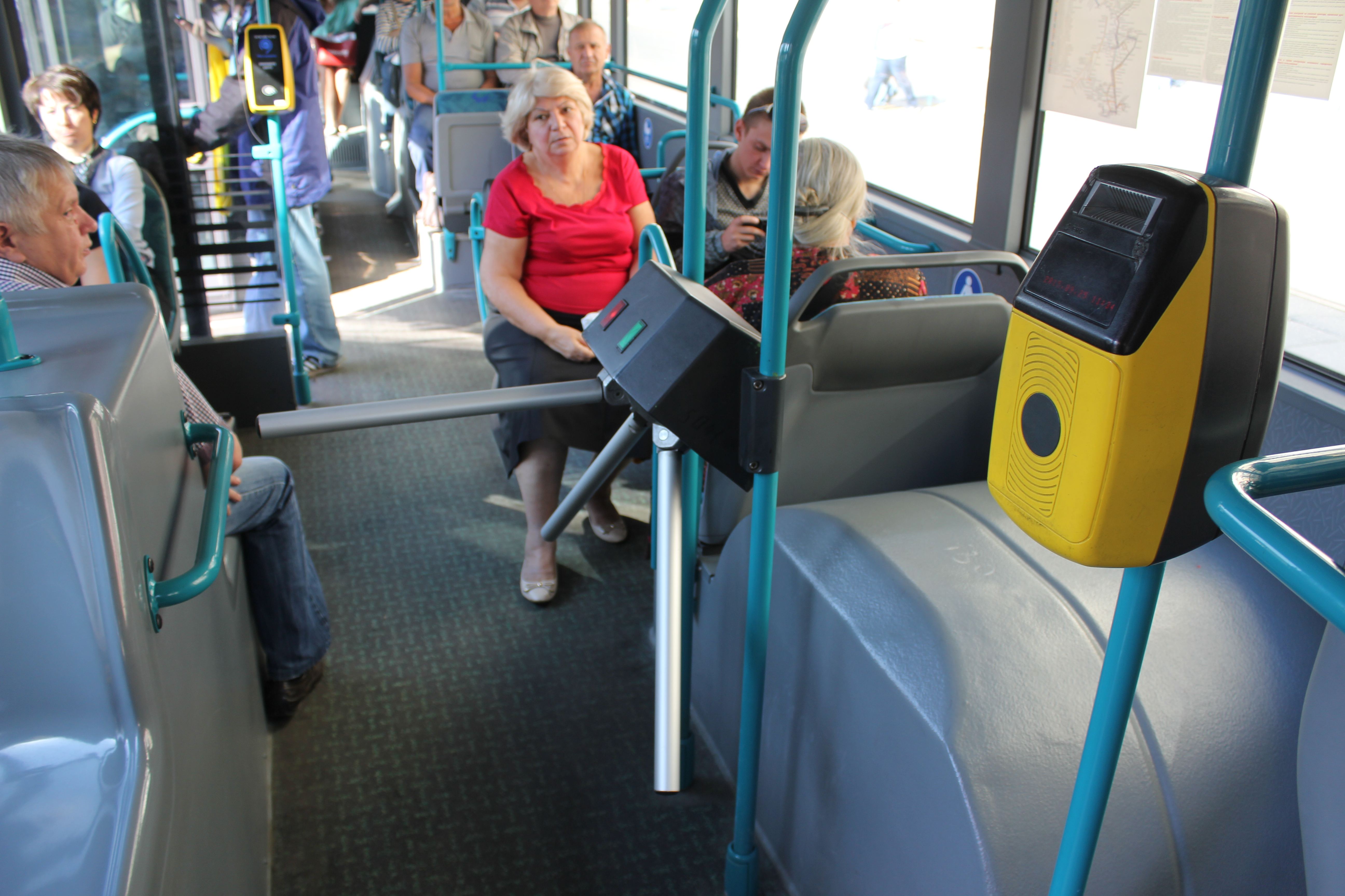 Турникет в автобусе в Москве